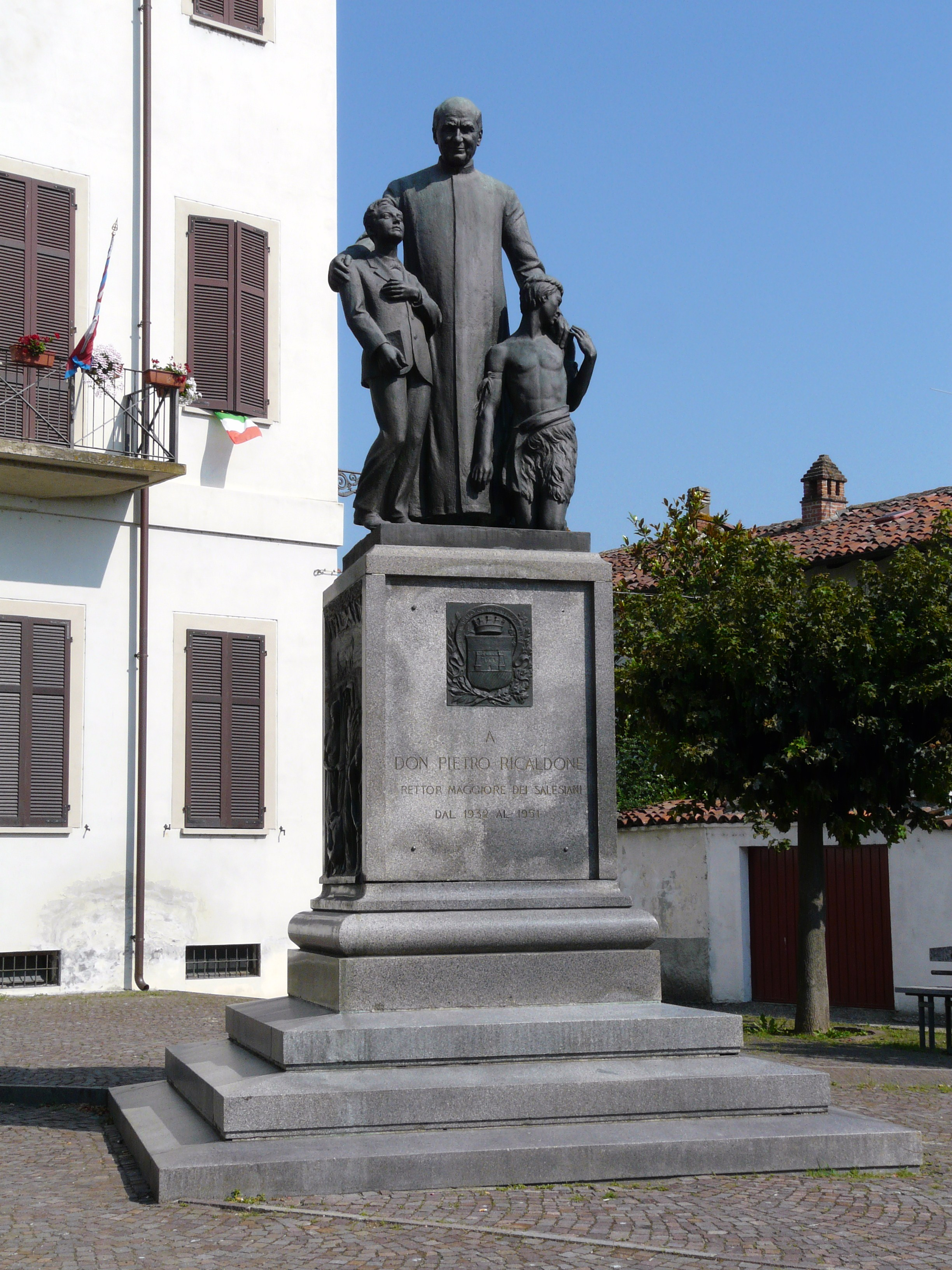 Monumento a don Pietro Ricaldone, Mirabello Monferrato, Piemonte, Italia